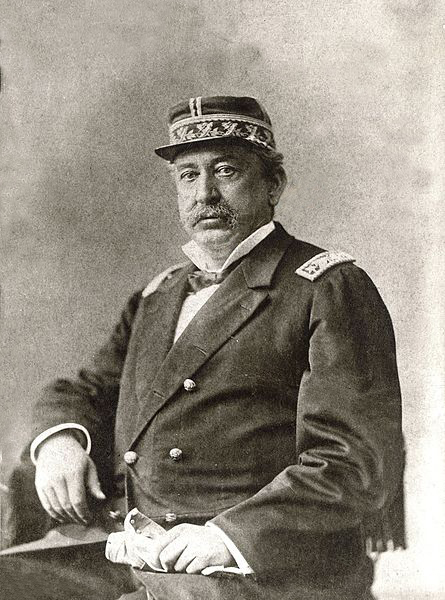 Pedro Lagos Marchant (1832 - 1884)